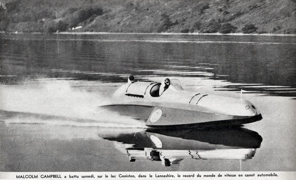 Malcolm Campbell le 19 août 1939 sur Bluebird K4 1750CV, pour son record mondial de vitesse aquatique à Coniston Water, Lancashire (226,784 km/h... embarcation lestée de 55.000 balles de ping-pong).